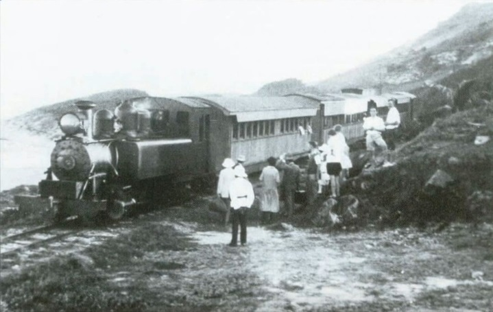 Barbados Railway